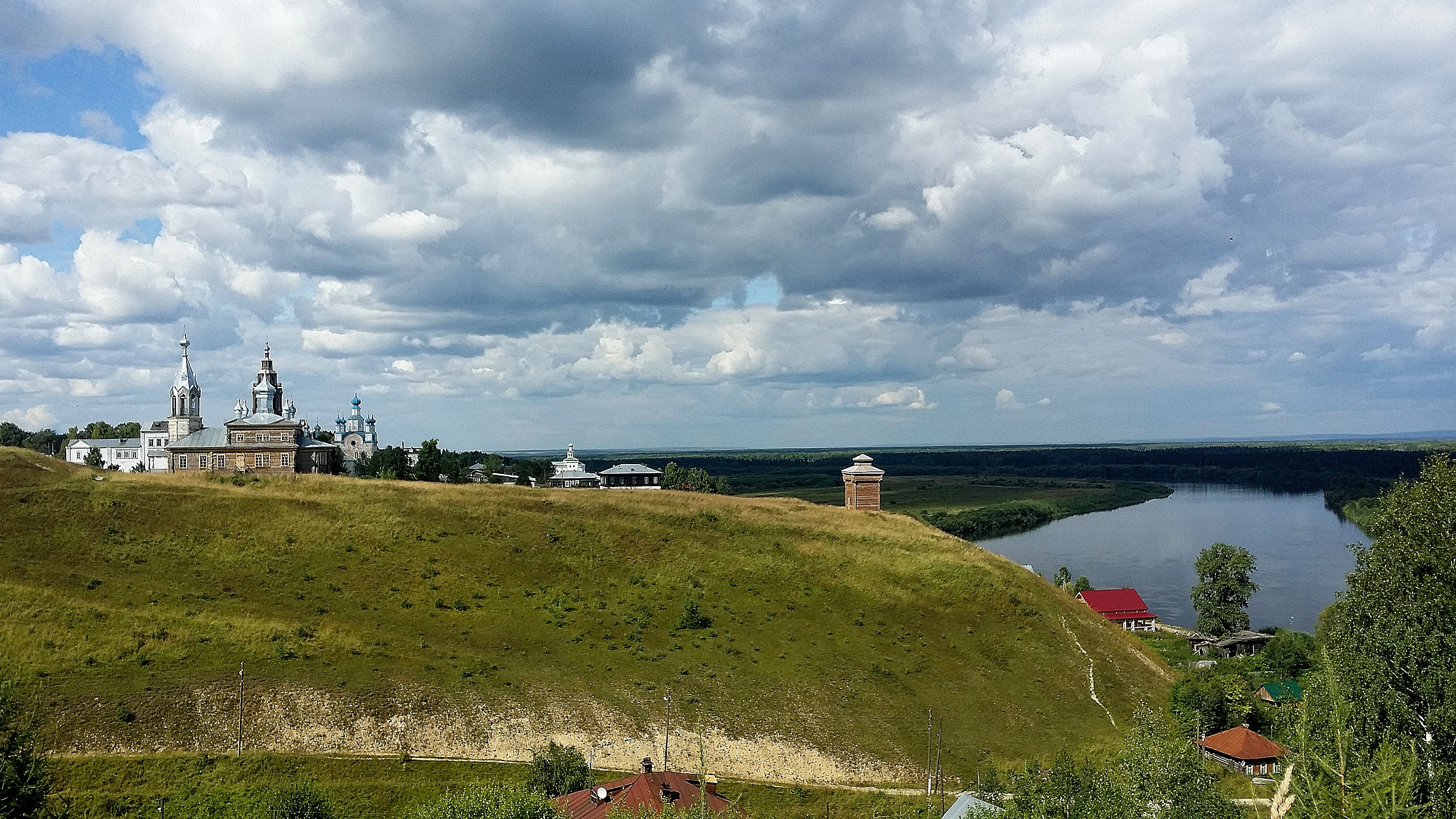 Городище Троицкое: Троицкая гора, правый берег р.Кама, Чердынь, Чердынский район, Пермский край